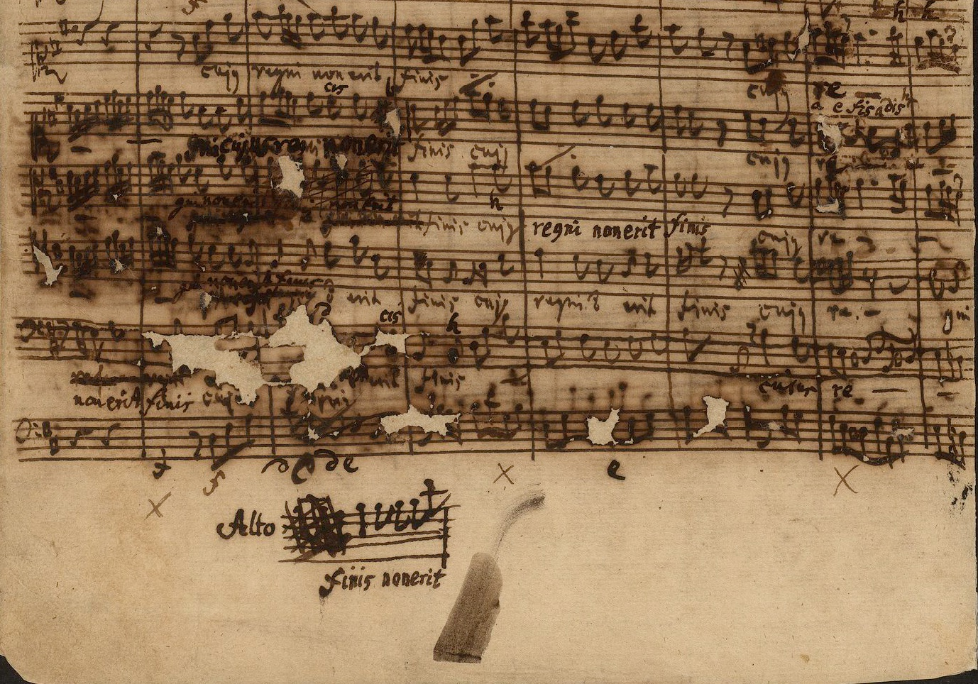 Johann Sebastian Bach, Messe in h-Moll BWV 232, Autograph des Credo mit Revisionen